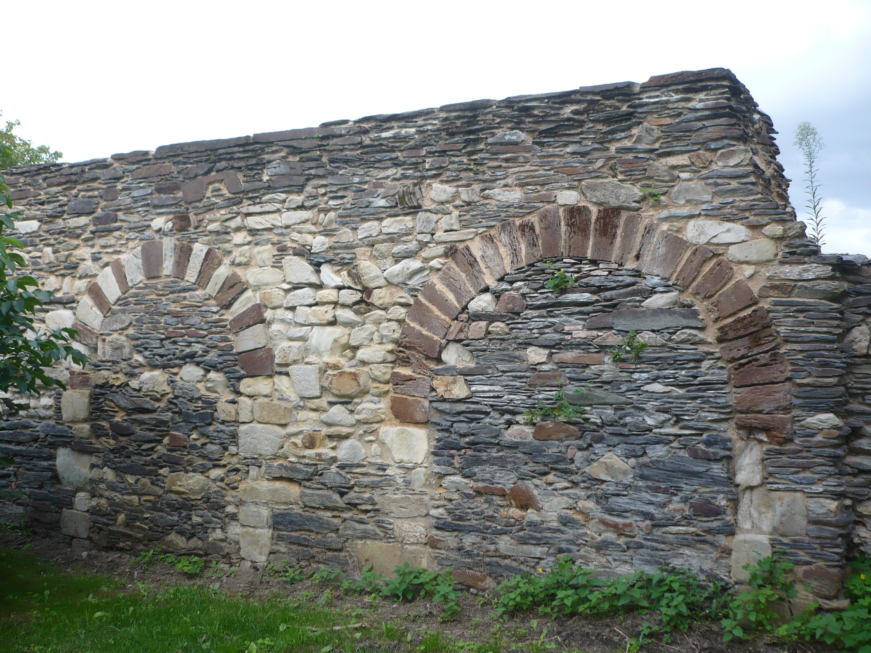 Nyoiseau - Abbaye - mur du cloître 2